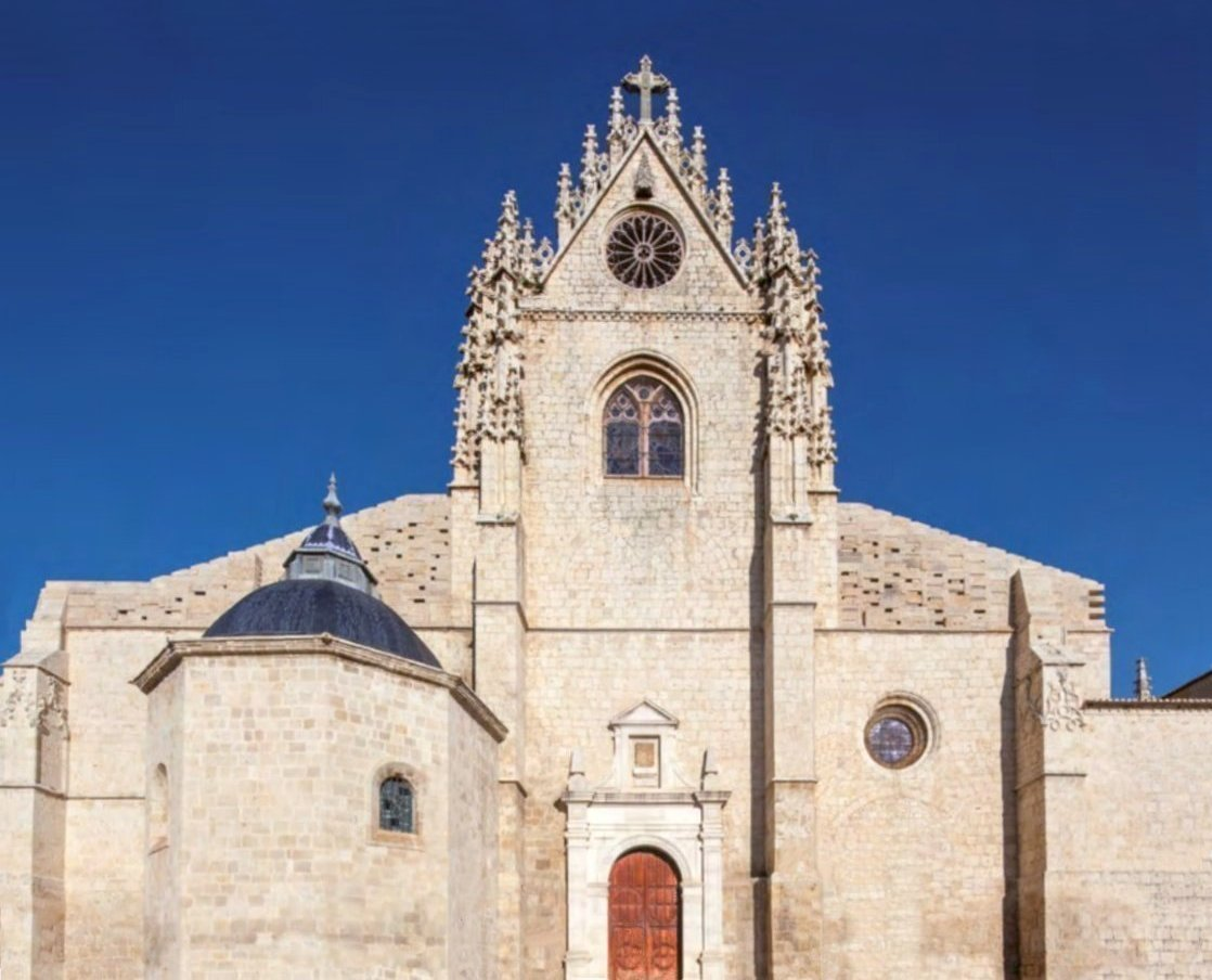 Fachada oeste restaurada de la Catedral de Palencia, España